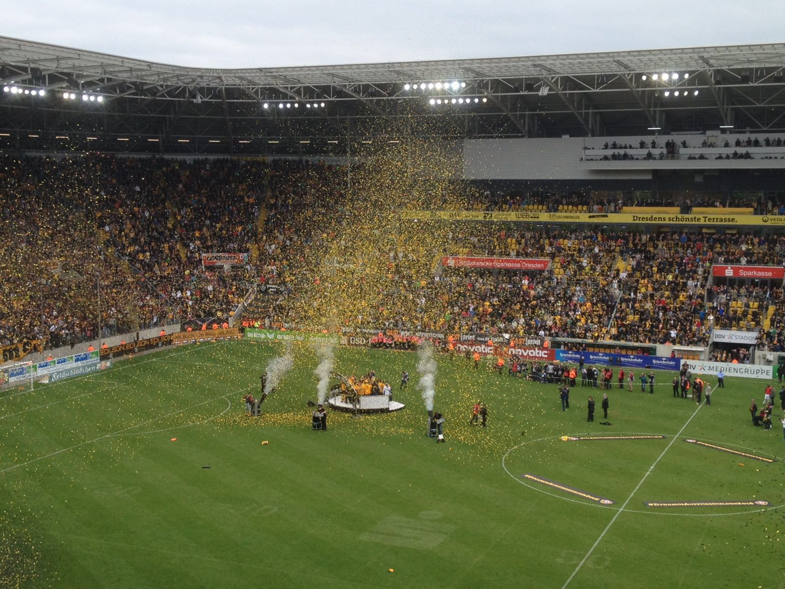 Aufstiegsfeier 2.Bundesliga zur Saison 2016/2017